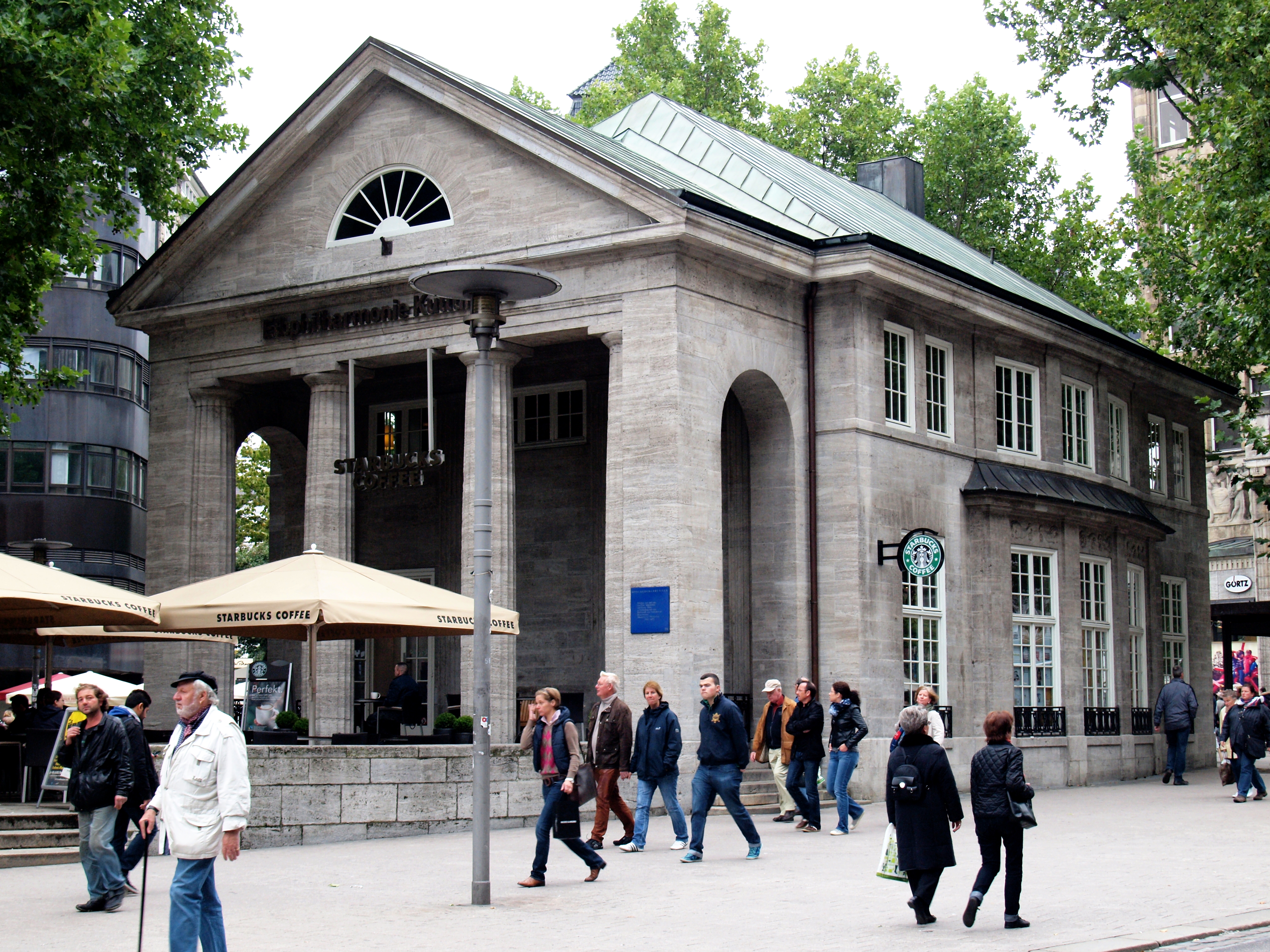 ehemalige öffentliche Bücherhalle, erbaut 1914 nach den Entwürfen von Fritz SchumacherThis is a photograph of an architectural monument.